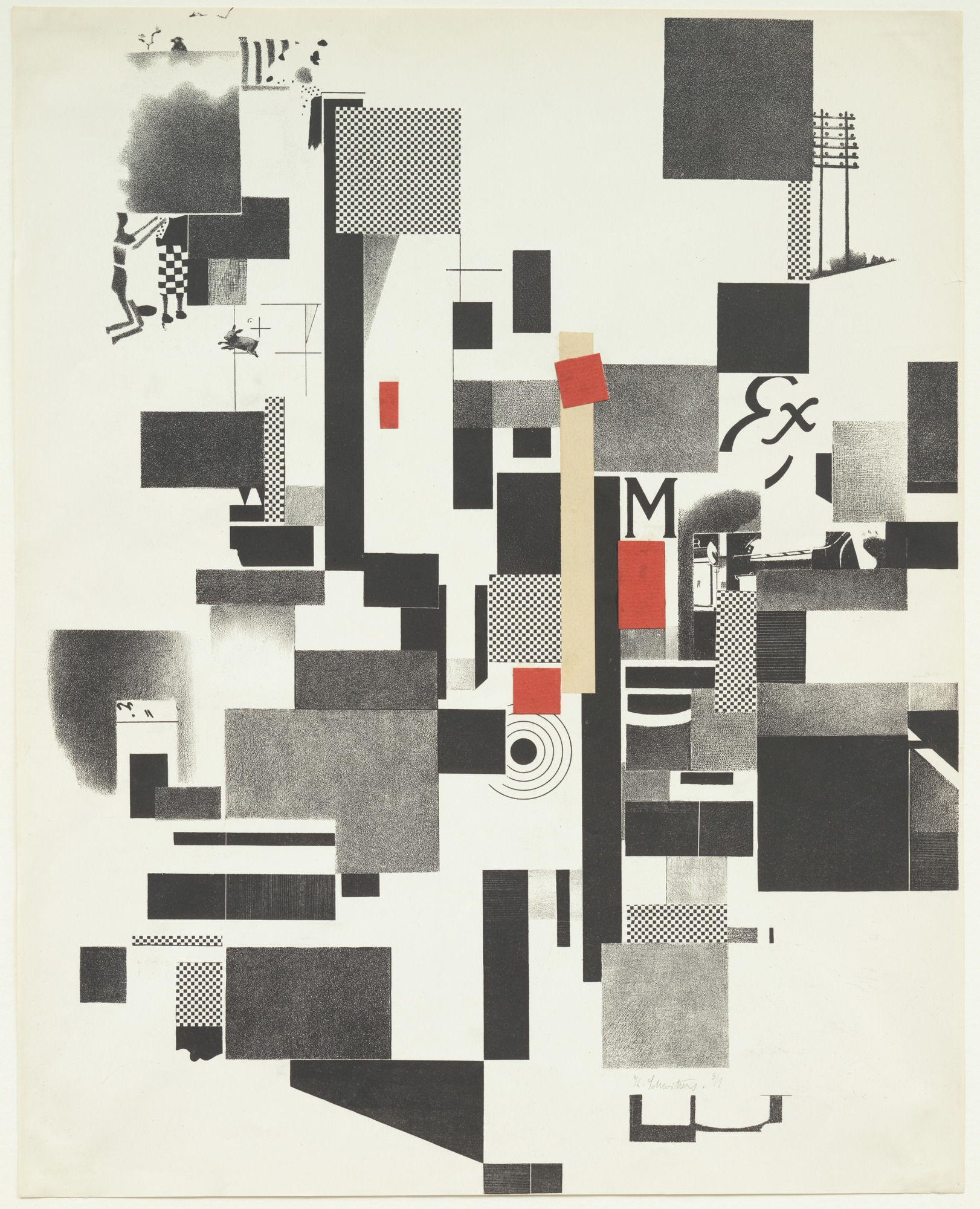 Merz 3 (1923), de Kurt Schwitters, litografía, Museum of Modern Art, Nueva York